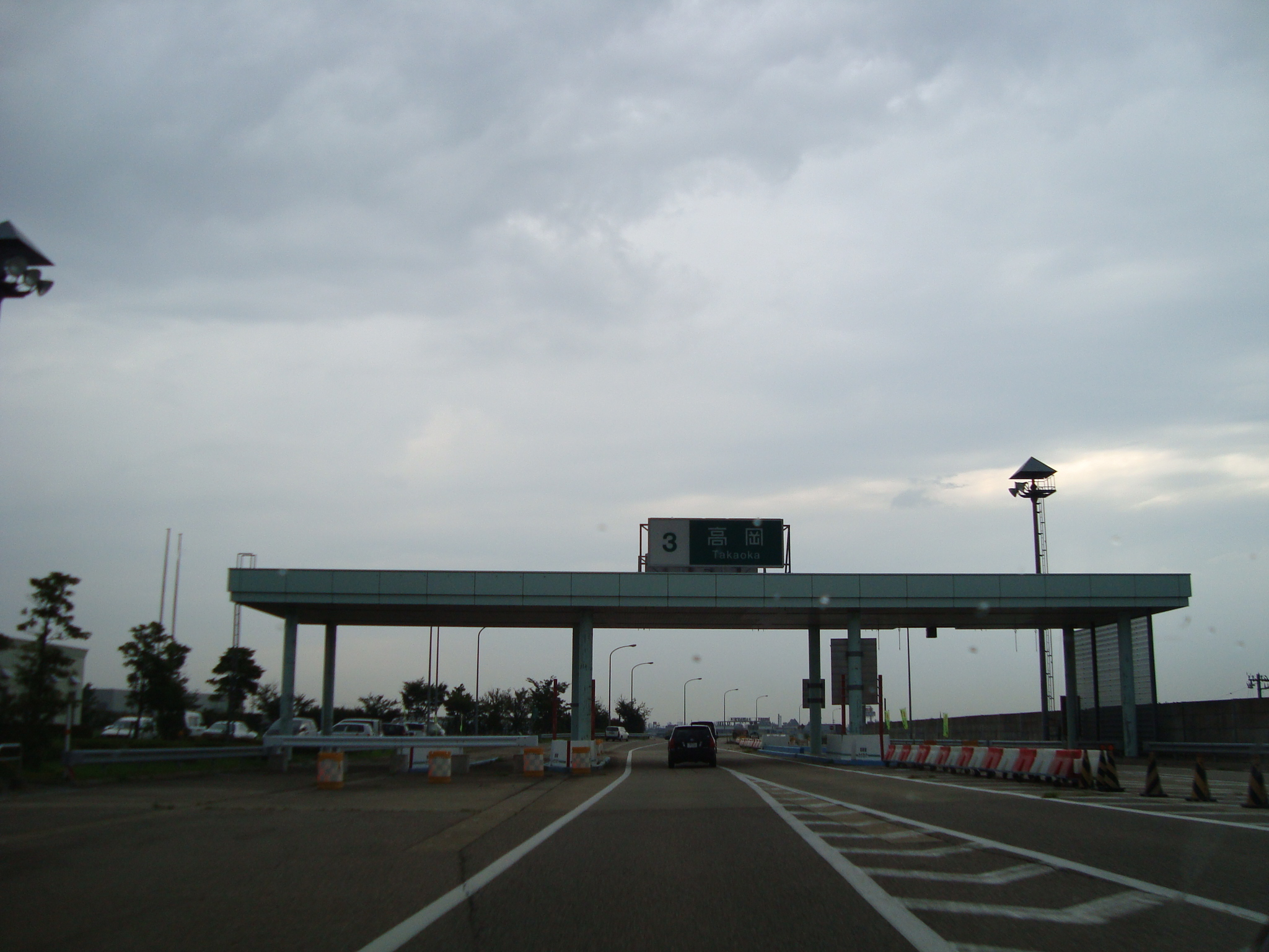 能越自動車道 高岡インターチェンジ